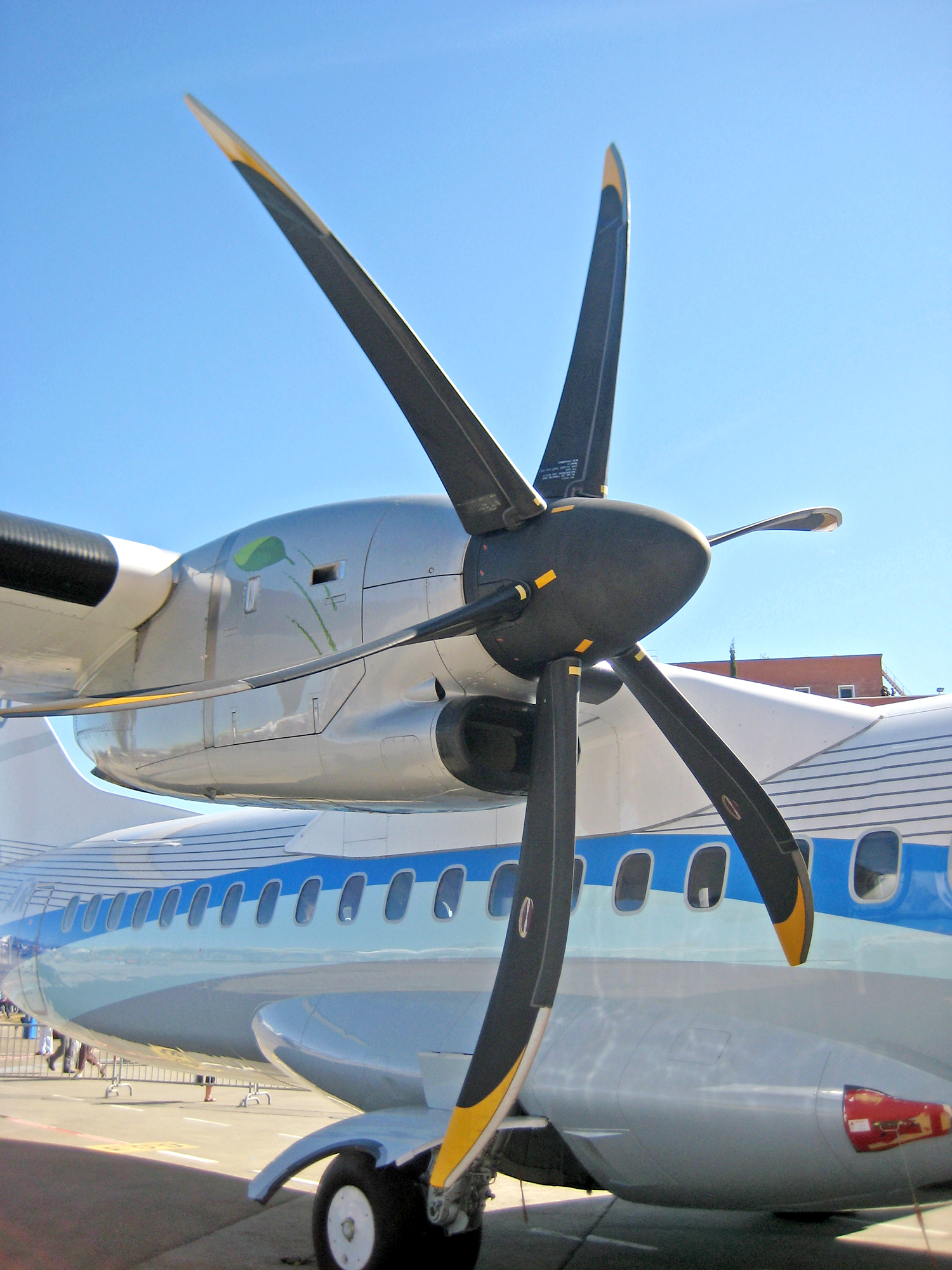 Un moteur de l'ATR 600 aux Airbus Family Days 2010 à Toulouse